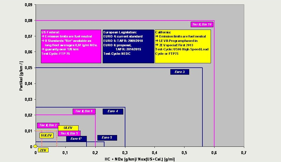 Zeigt eine vergleichende Gegenüberstellung europäischer und amerikanischer Limitierungen von Partikeln (PM) über der Summe aus HC und Stickoxiden (Europa), bzw. Partikeln über Stickoxiden (Amerik.)Für Europa: Fzg. mit Dieselmotoren. Für Amerika: keine Unterscheidung zw. Otto- und Dieselmotoren